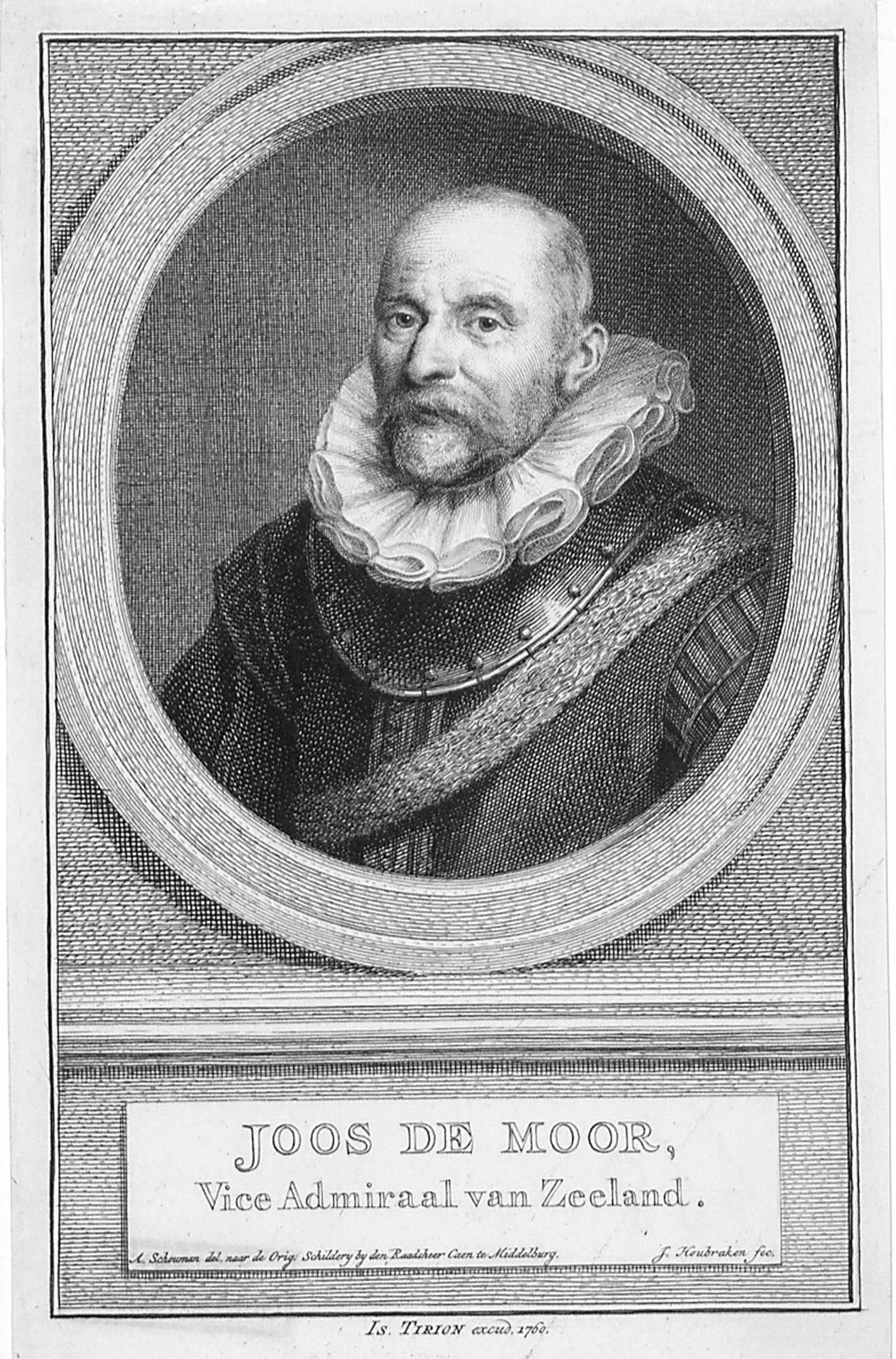 Uit: Atlas van Zeeland ..., Amsterdam, 1760. Naar originele schilderij bij Raadsheer Caen, te Middelburg